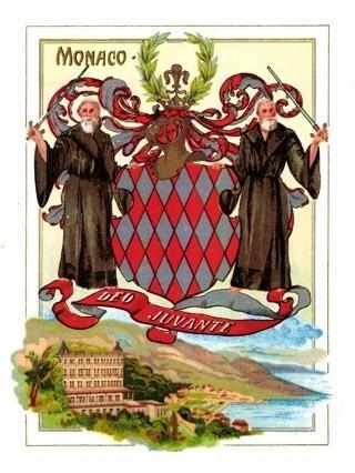 Wappen Fürst von Monaco (Vollwappen mit Schildhaltern (Mönche mit Schwertern); Helmzier: Lilie zwischen zwei zu einem Kranz gebogenen Lorbeerzweigen) über monegassischer Landschaft mit Gebäuden. Wappenspruch: "Deo Juvante" (= "Mit Gottes Hilfe").